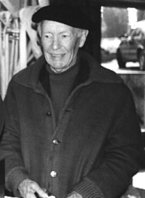 De Lucien Wercollier a sengem Atelier (ëm 1995).